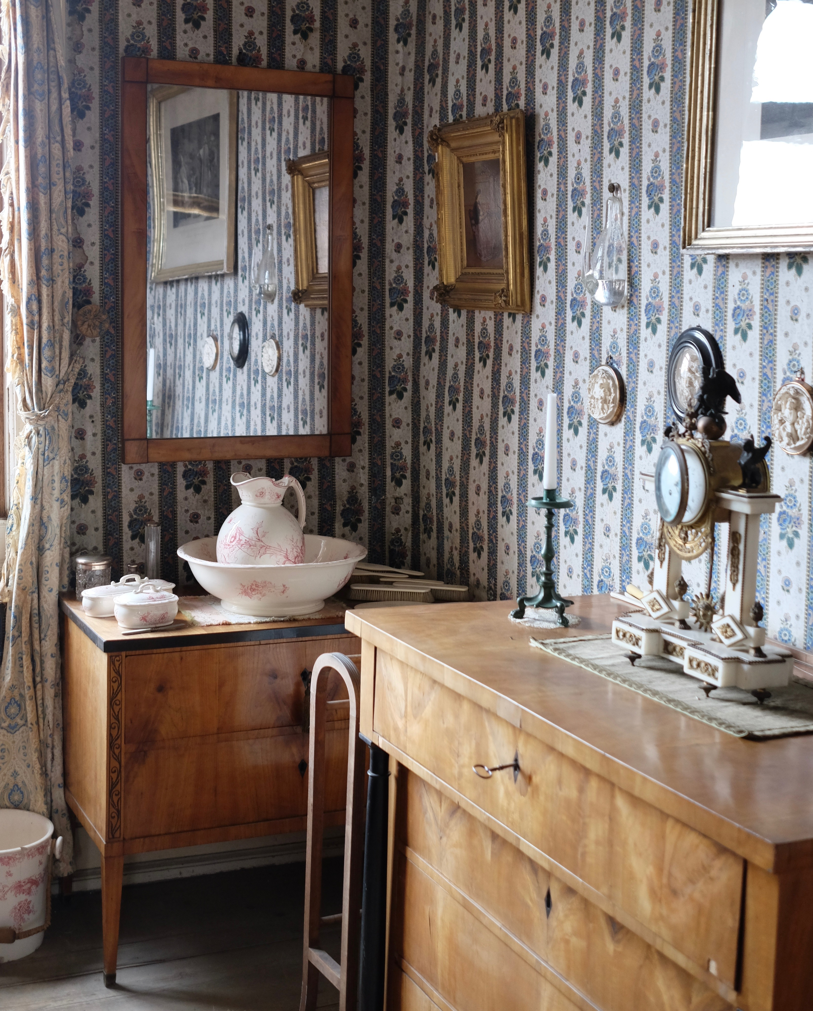 Einer der historischen Wohnräume im Brentanhaus. Das durch Goethe genutzte Schlafzimmer mit teilen der von ihm genutzten Gegenstände.